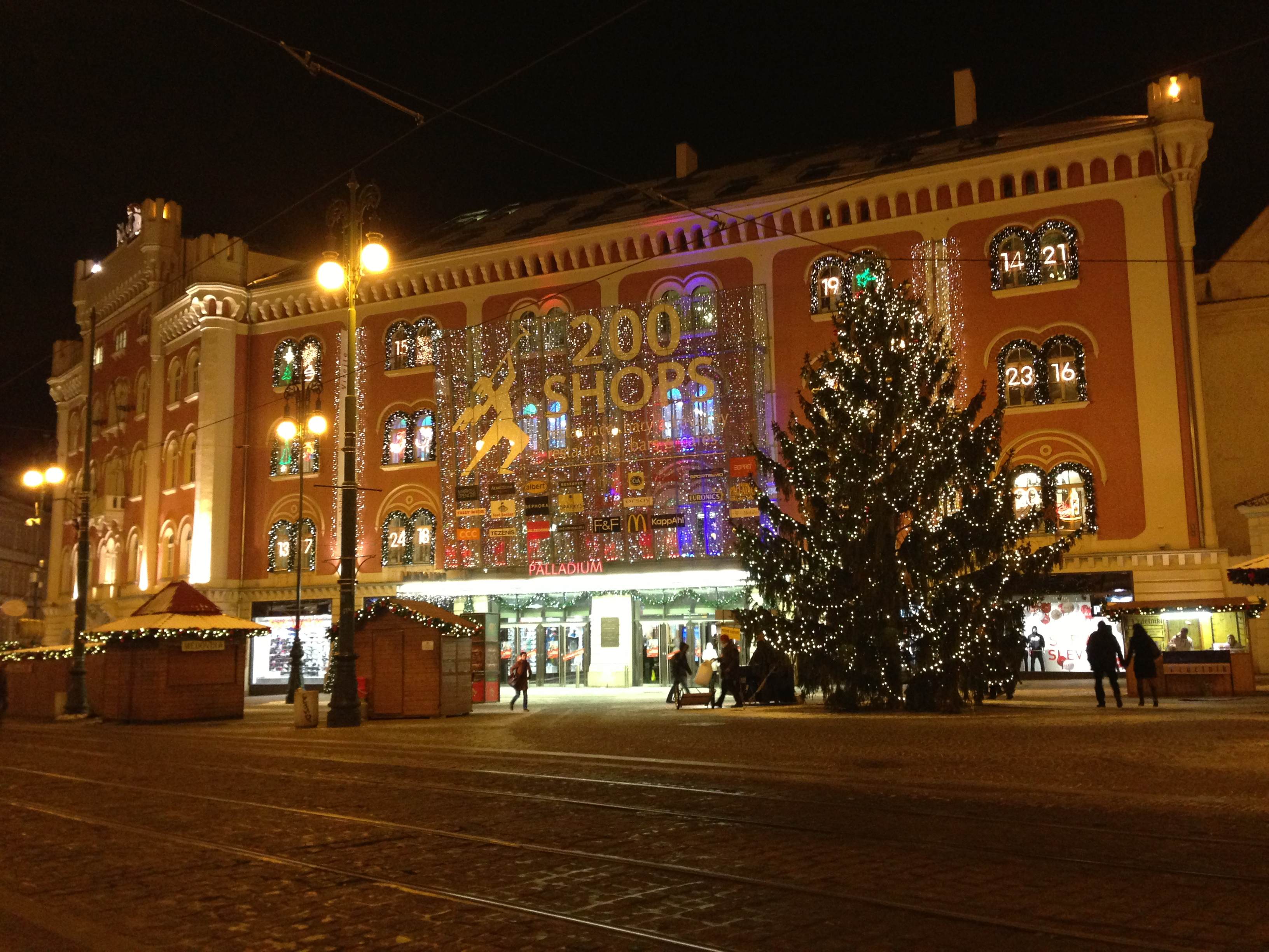 לוח הציפייה על הפלאדיום בפראג